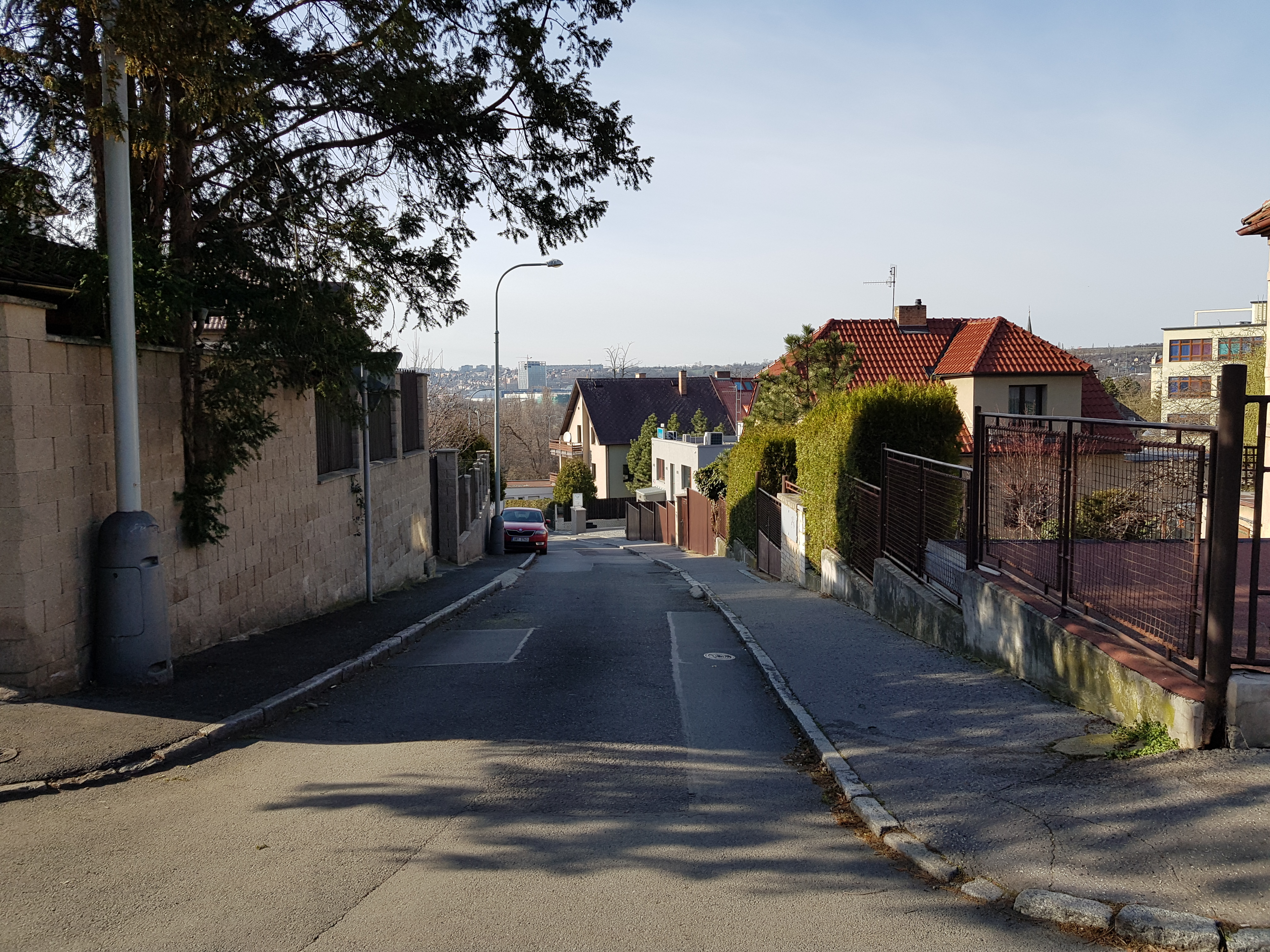 Ulice Litošická, Praha 14-Hloubětín. Pohled od ulice V Chaloupkách dolů směrem k severozápadu